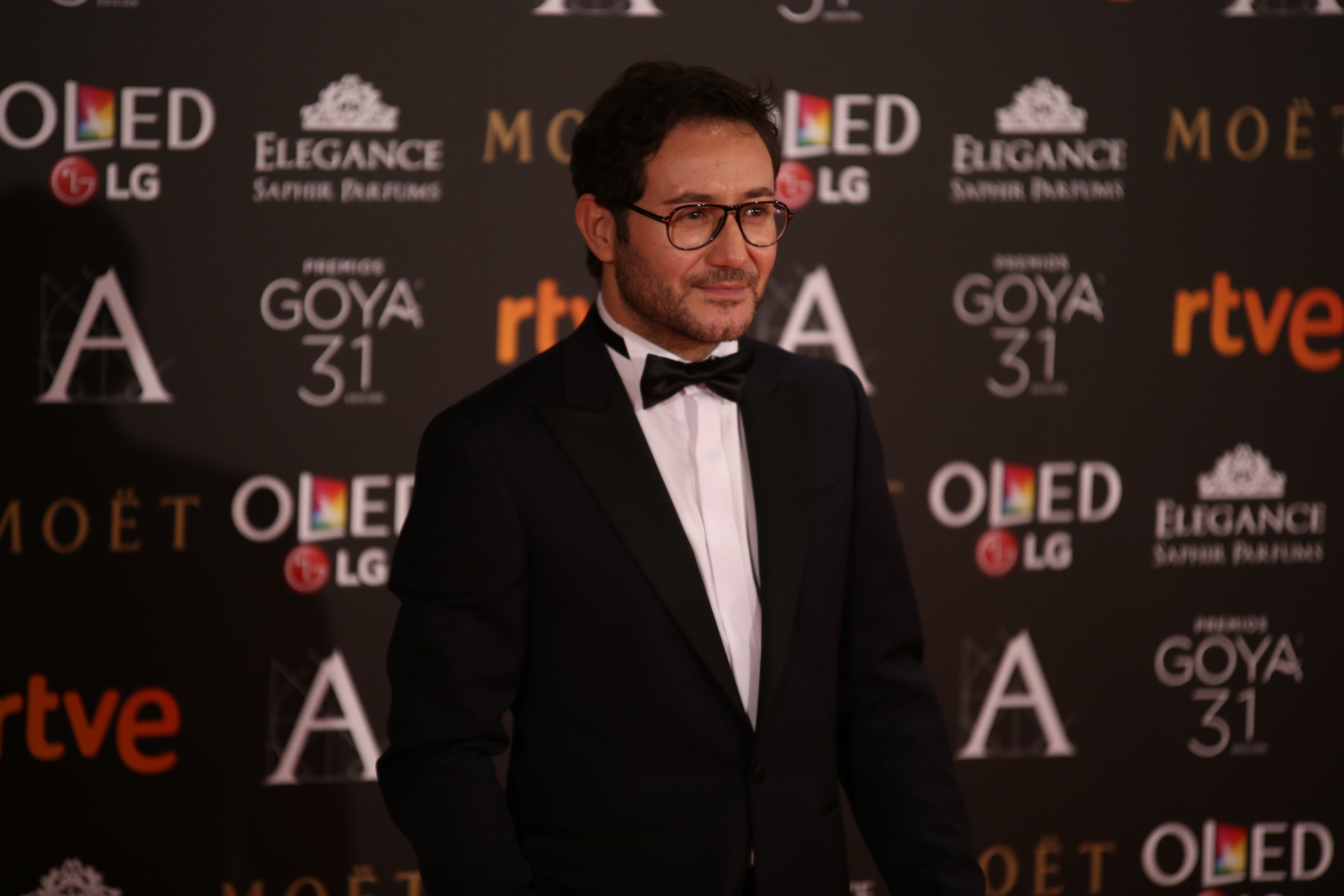 Premios Goya 2017